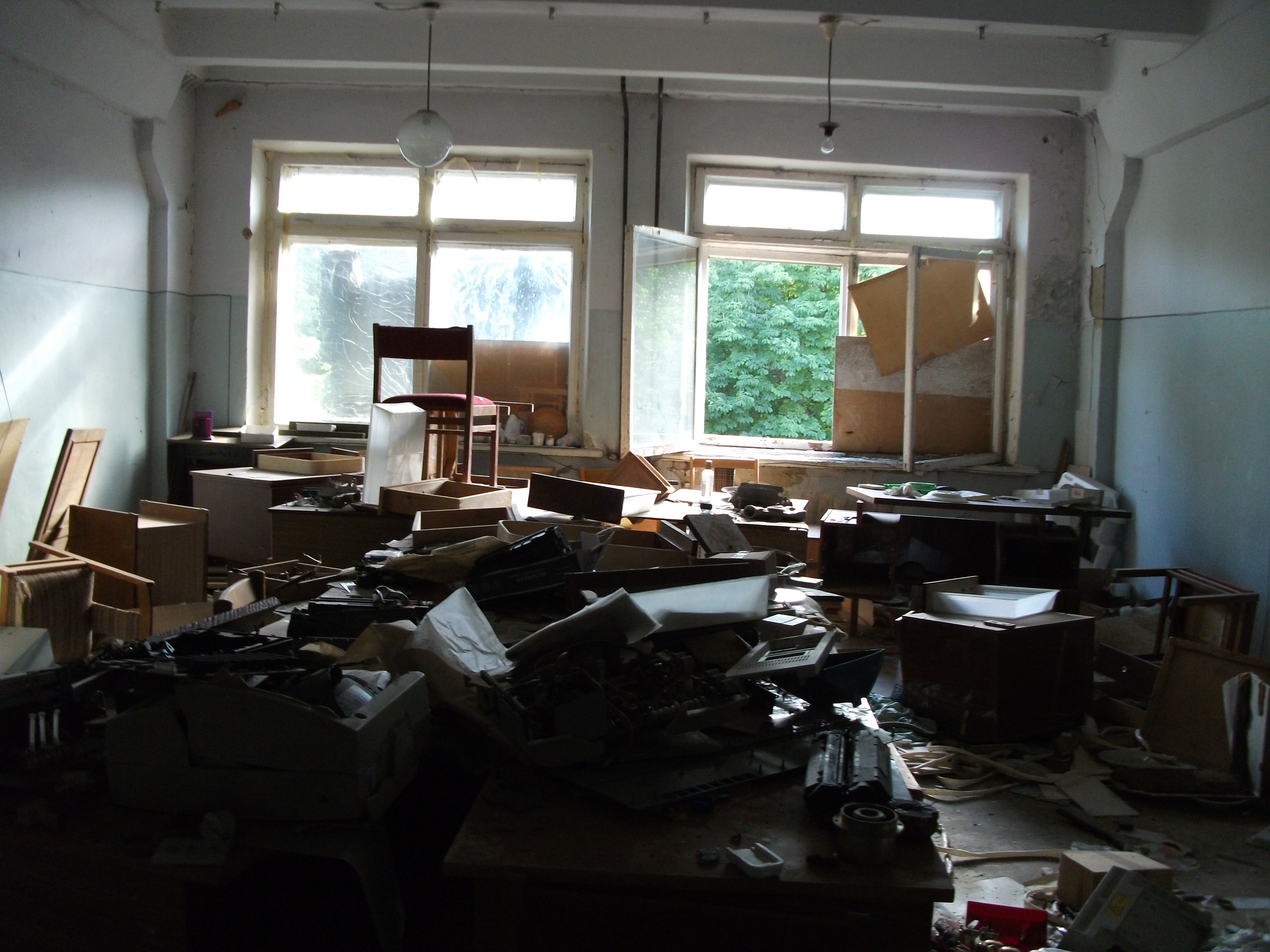 Один из кабинетов в корпусе № 2 Саратовского авиационного завода.